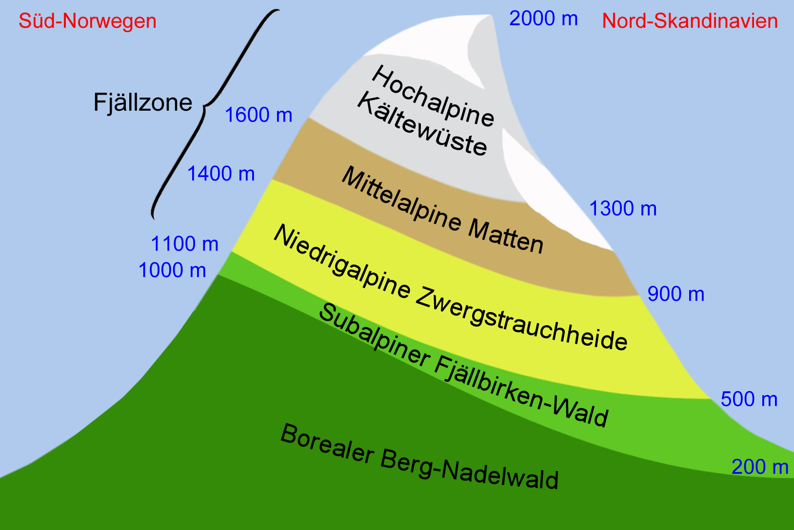 Höhenstufen und Vegetation im fennoskandinavischen Fjäll